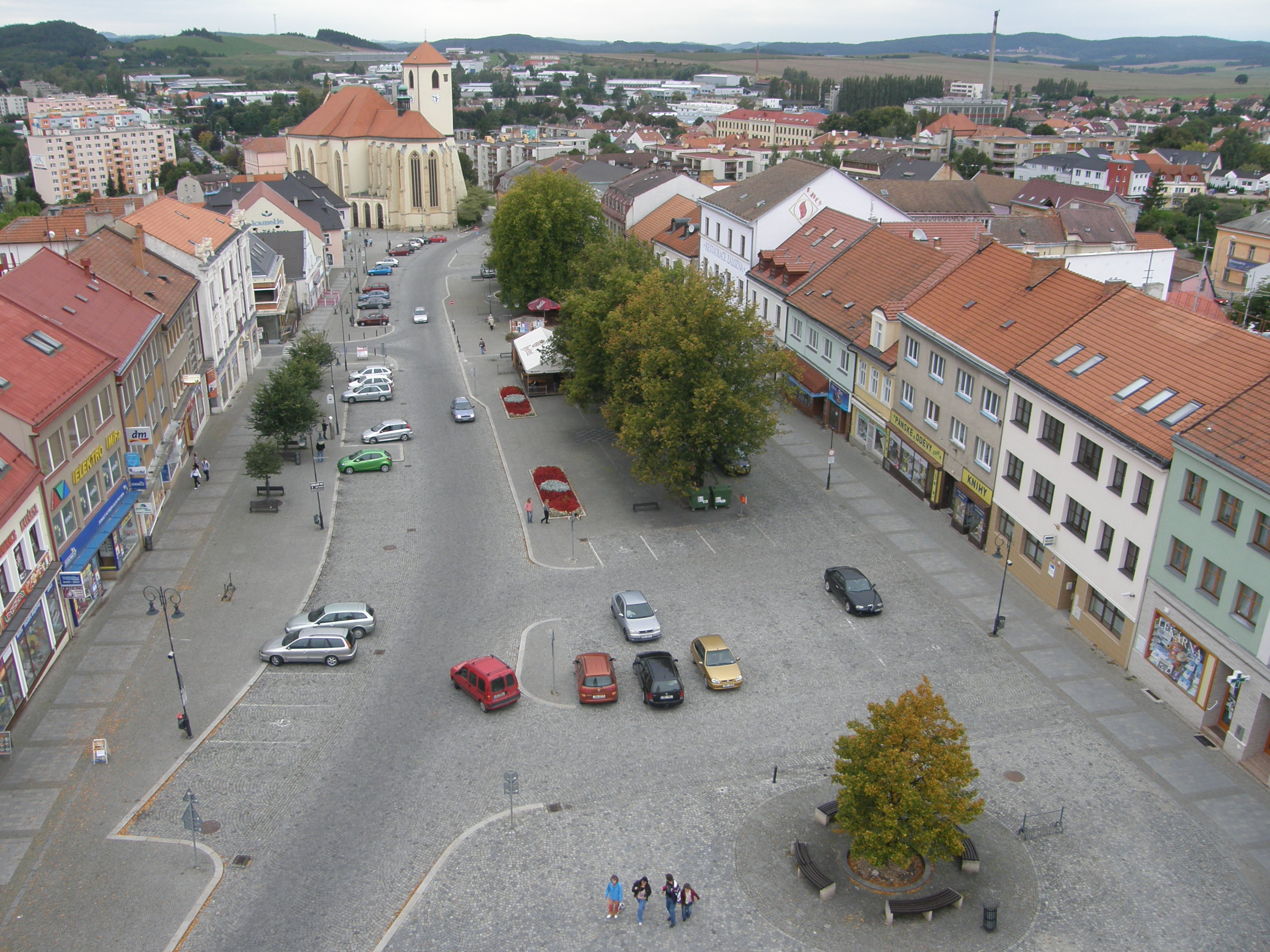 Masarykovo náměstí v Boskovicích foceno z radniční věže